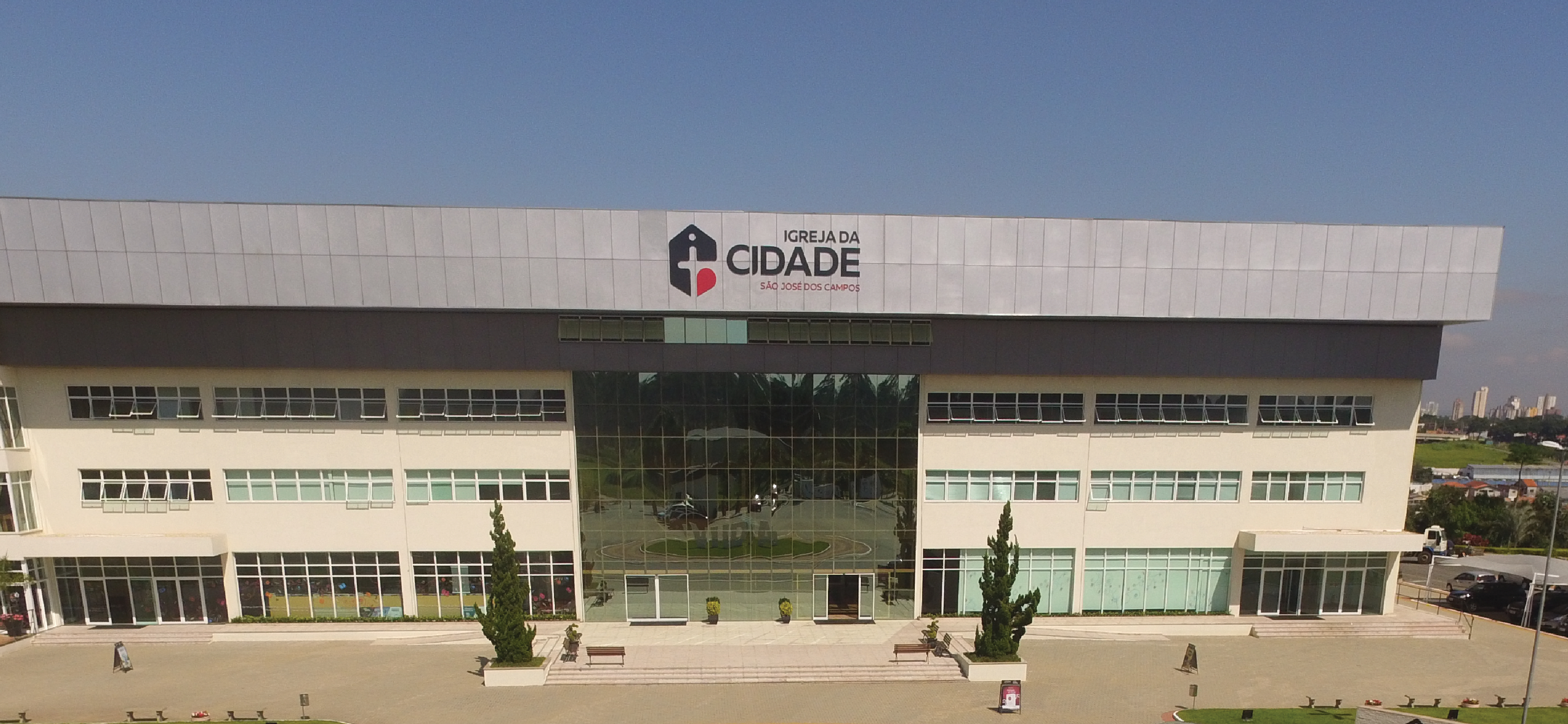 Foto da Igreja da Cidade em São José dos Campos